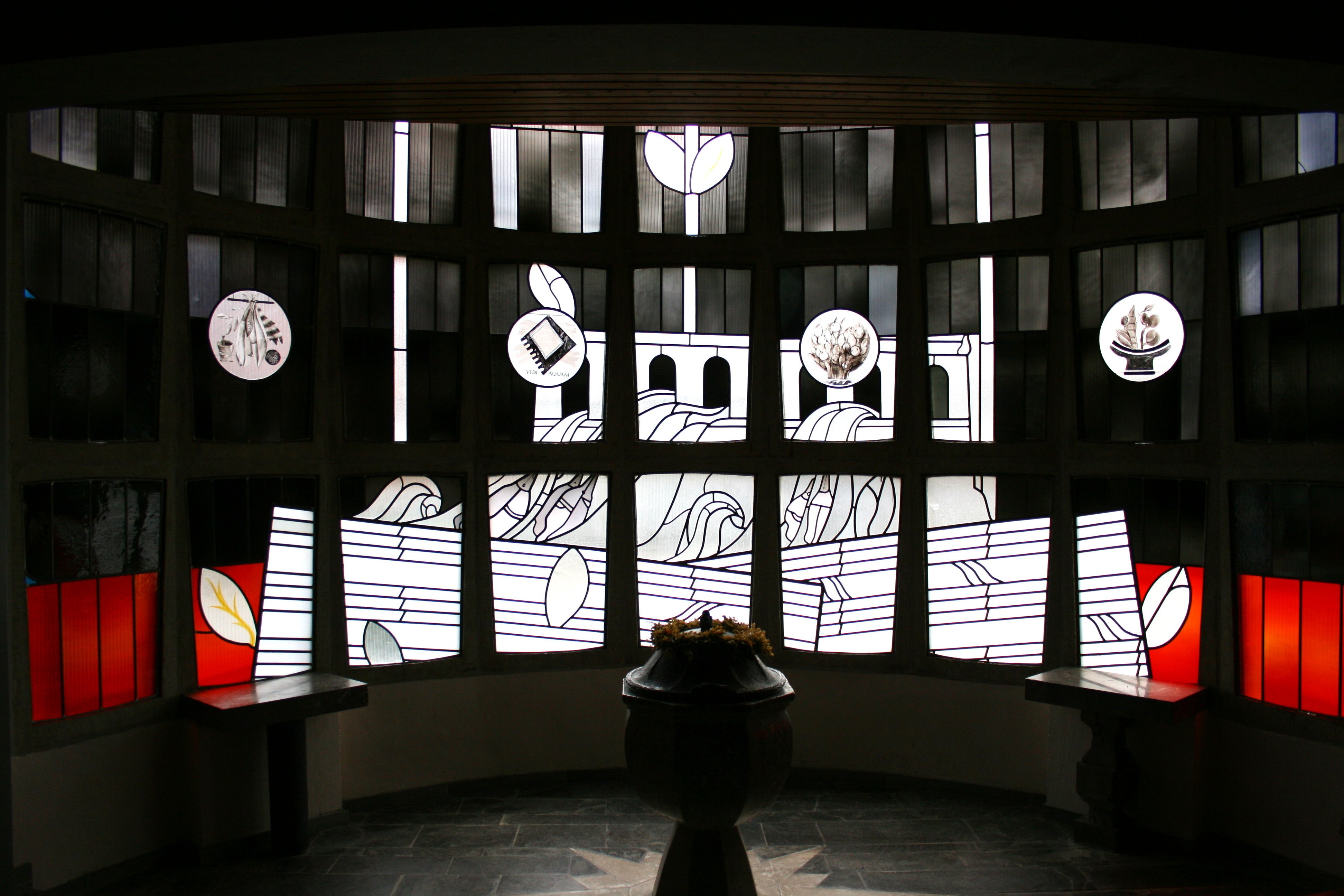 Sankt Mariä Himmelfahrt in Hückeswagen